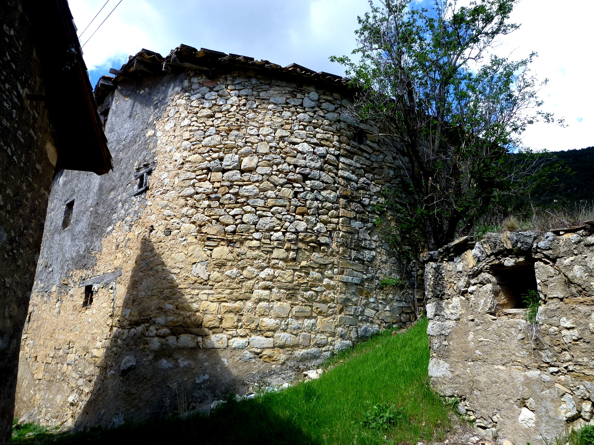 Part posterior de la masia Pasqüets i de la capella de Sant Cristòfol. A la dreta la cisterna coberta